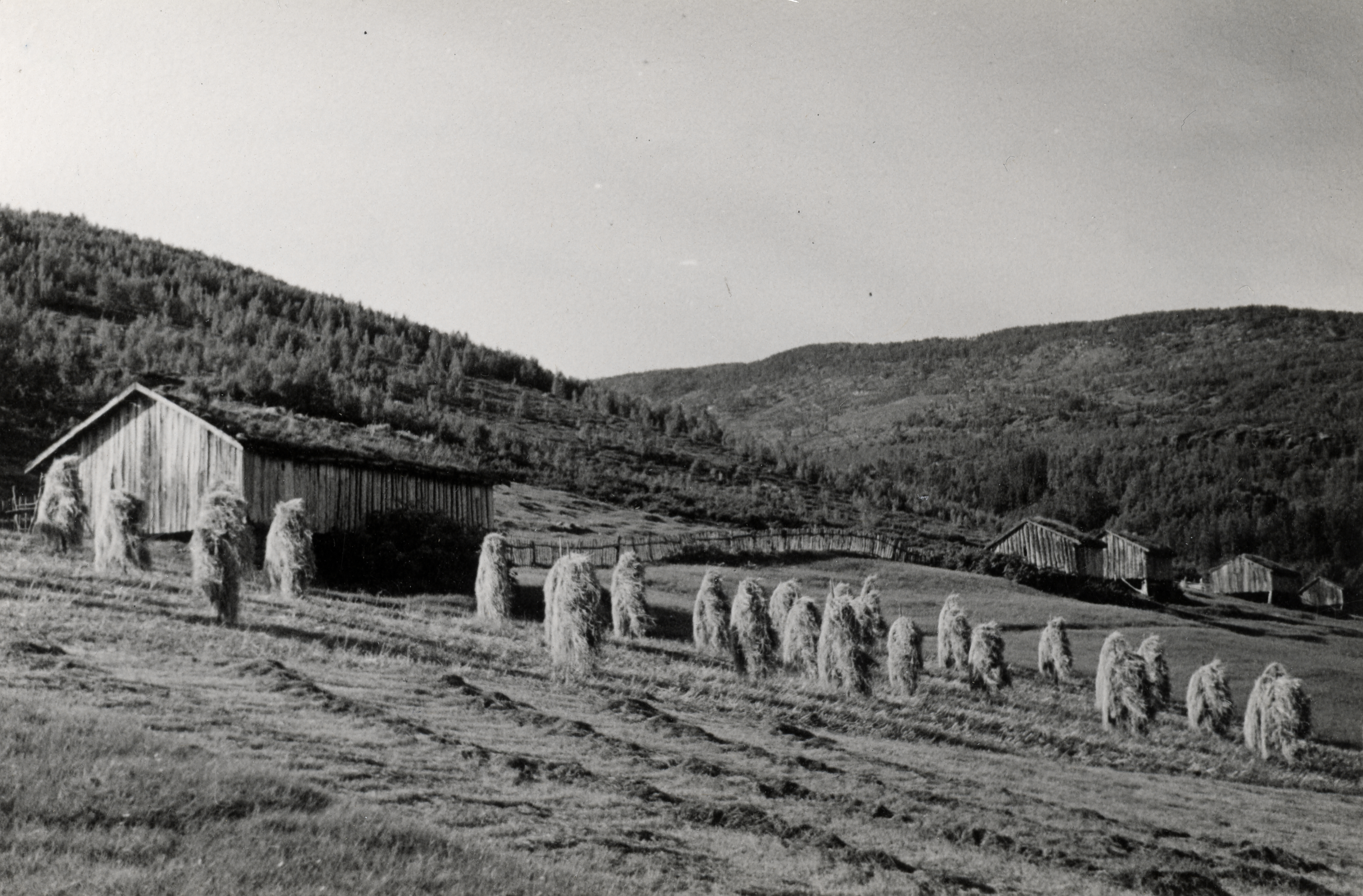 Aksel Pedersen`s hus, Misvær i Skjerstad, Nordland Sommerfjøs i grensen mellom innmark og utmark.